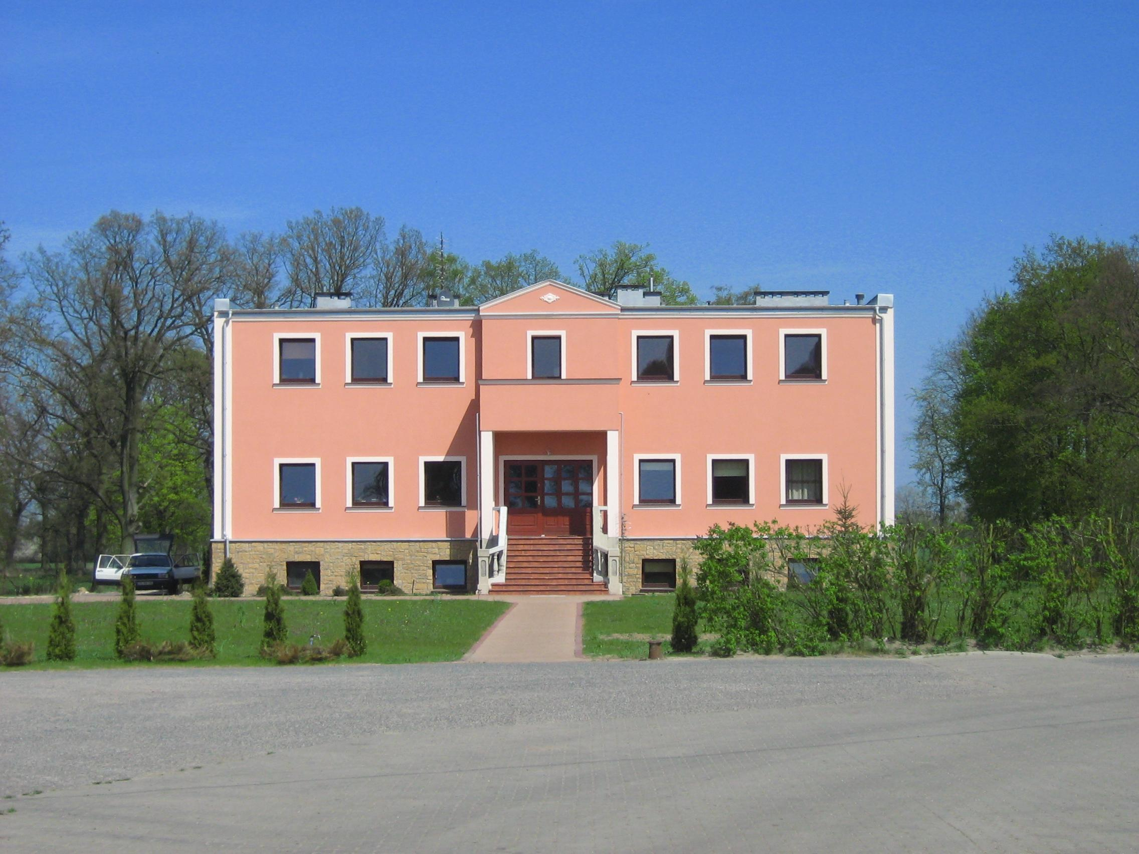 Dwór w Łuskowie